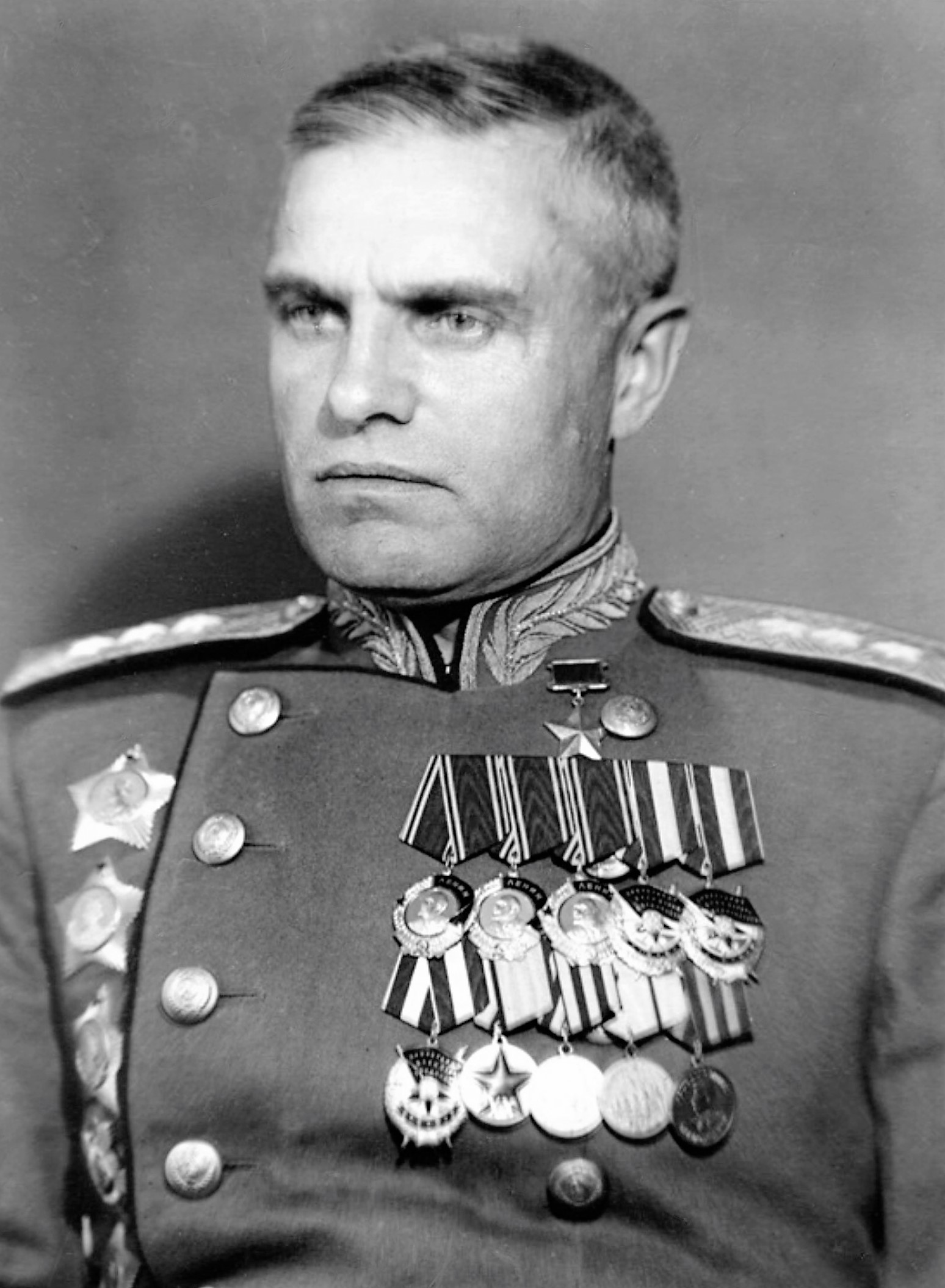 Генерал-полковник артиллерии Герой Советского Союза Василий Иванович Казаков